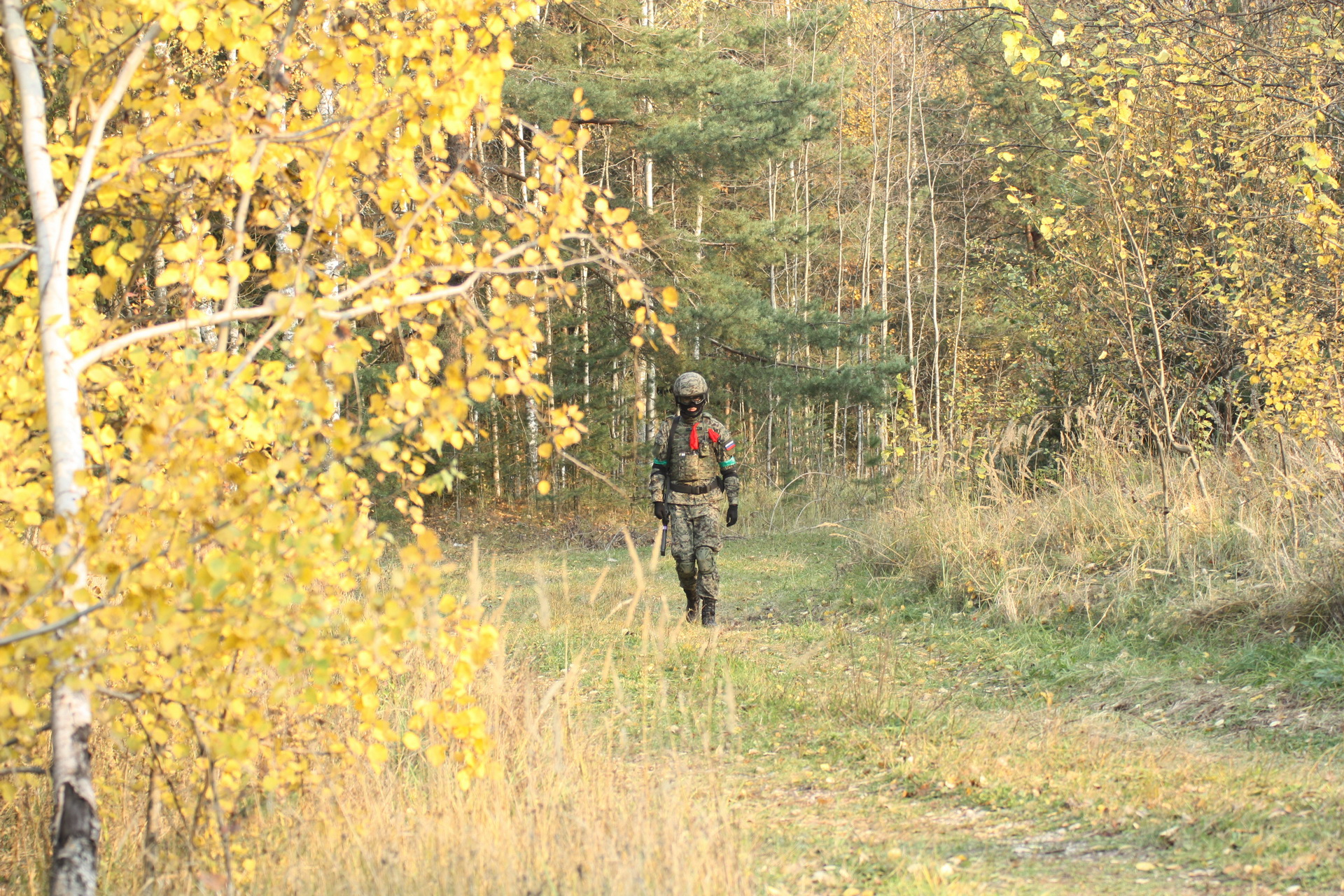 Свой Страйкбол